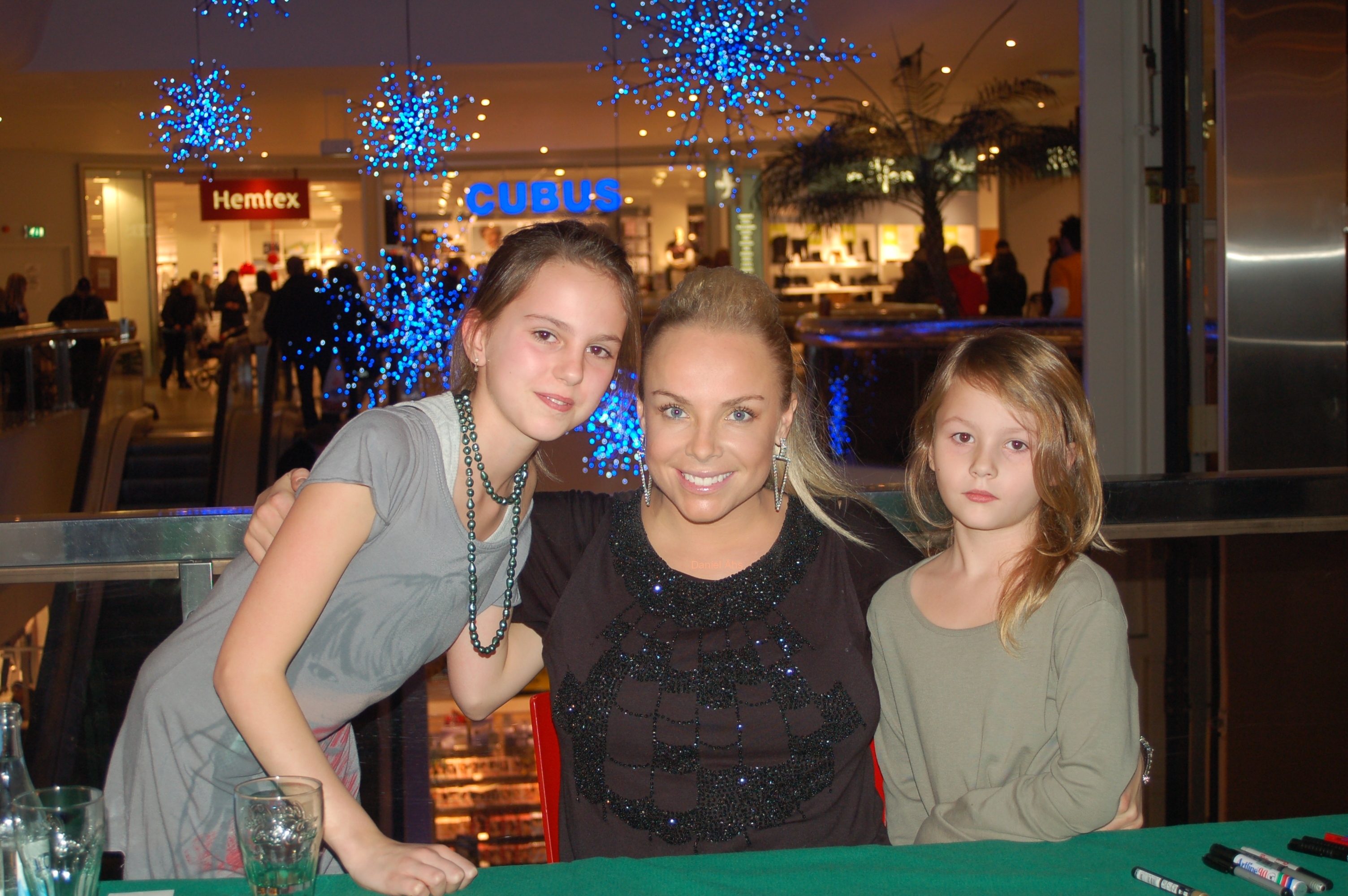 Marie Picasso Med två Norrköpings fan.